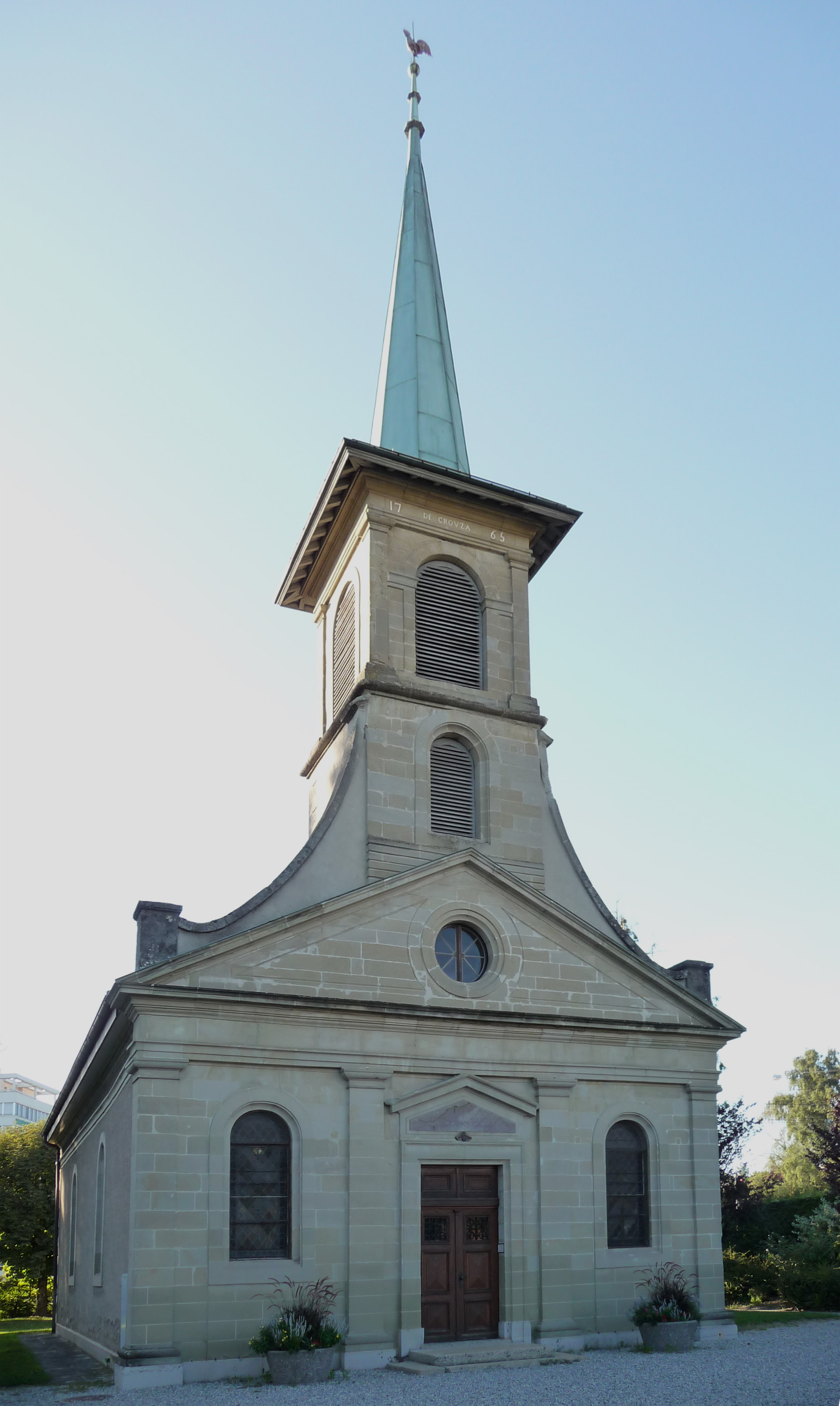 église de Prilly.